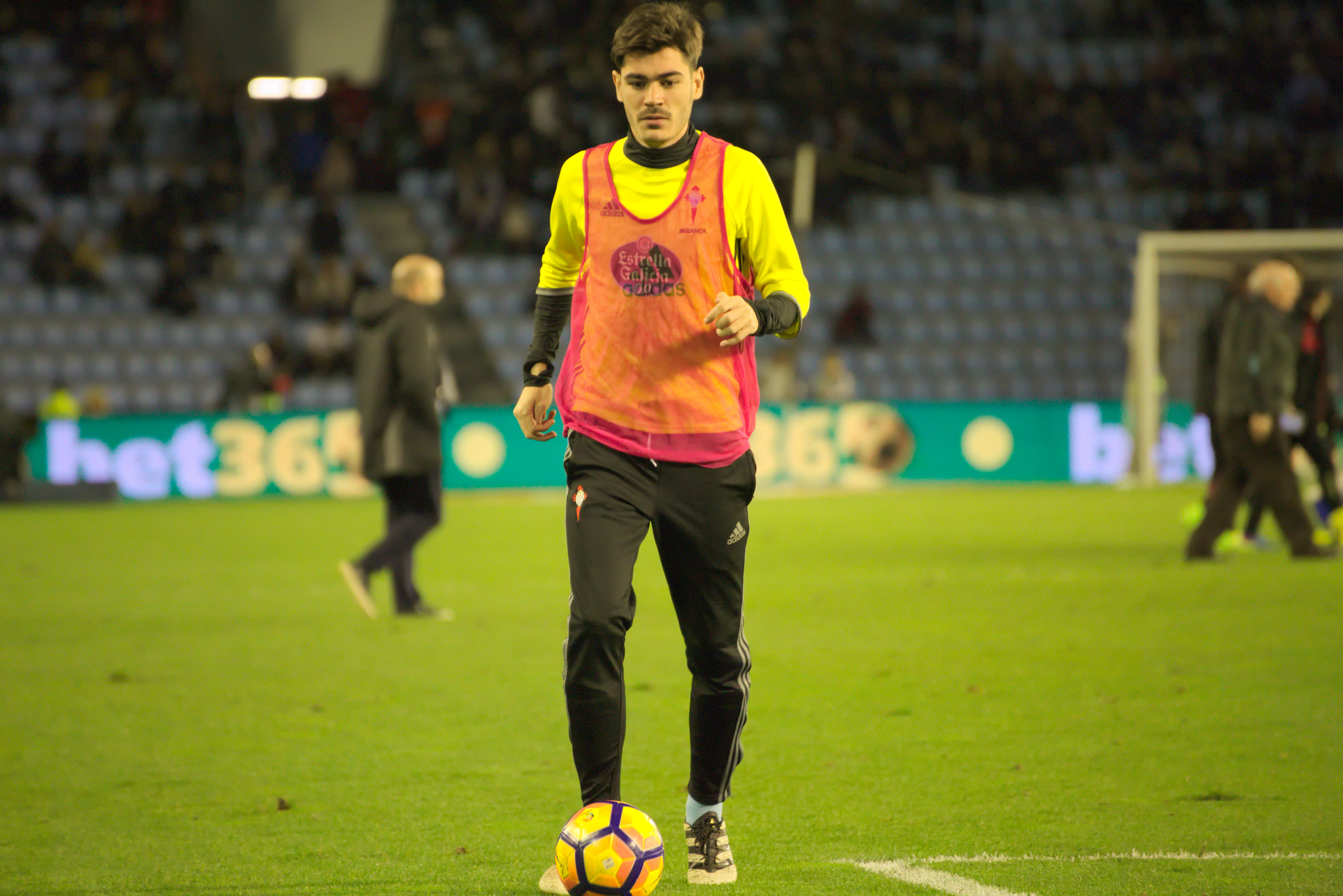 Jozabed Sánchez Ruiz - RC Celta de Vigo